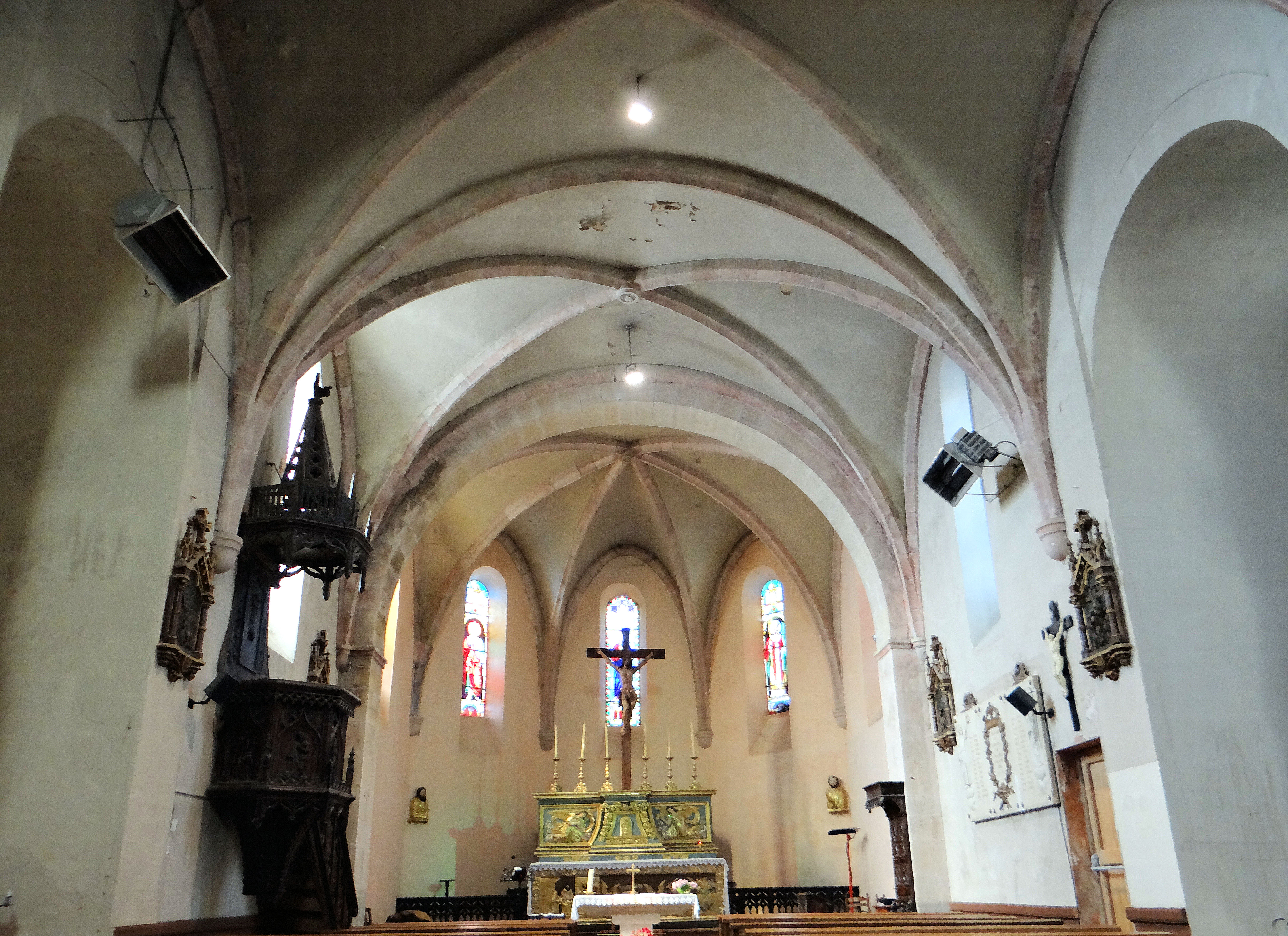 Verfeil - Église Saint-Pierre-ès-Liens - Nef et maître-autel